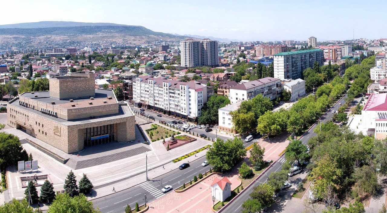 Столица Дагестана - город Махачкала